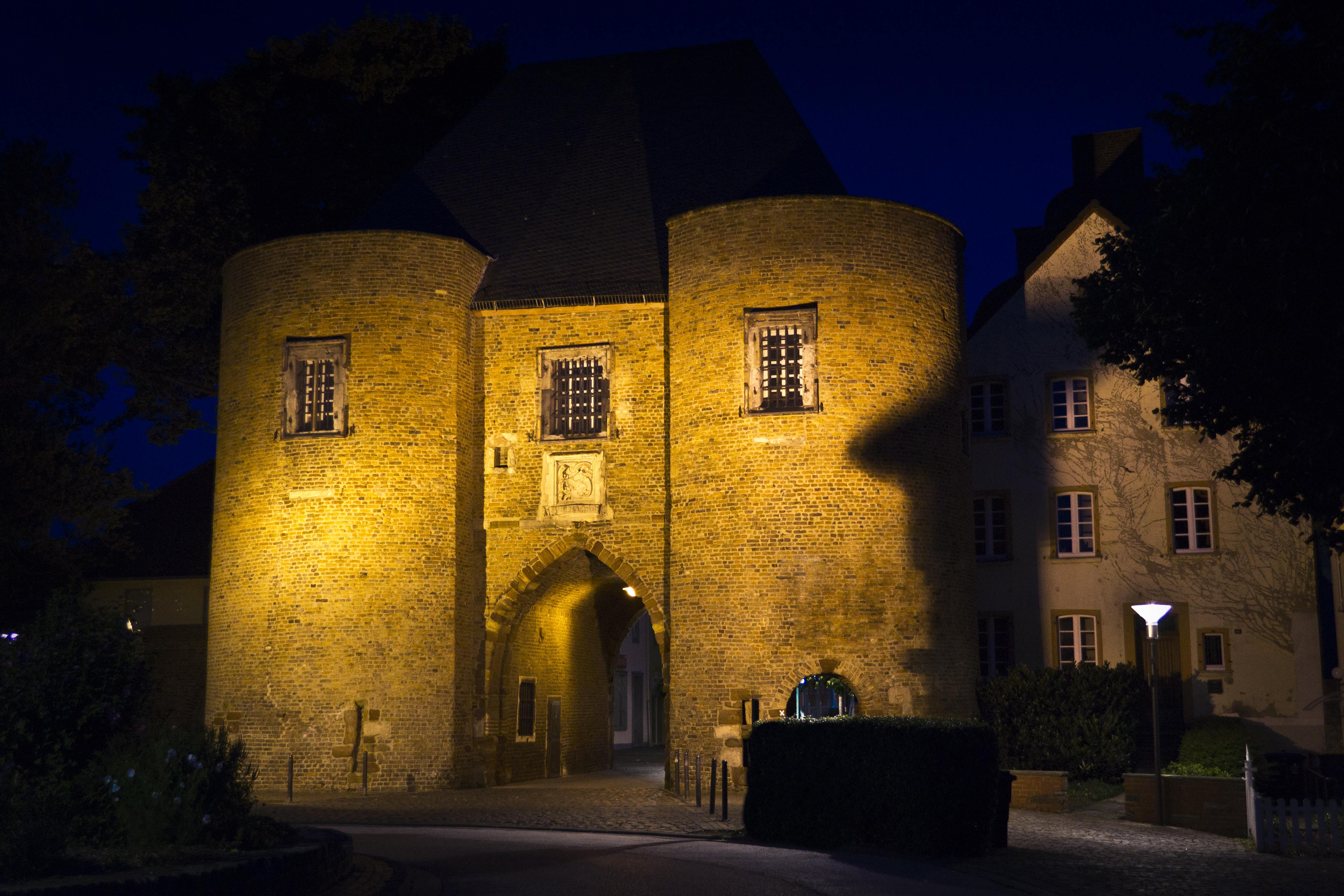 Das Aachner Tor in Bergheim, NRW stammt aus dem 14. Jahrhundert und trägt die denkmalnummer 14-This is a photograph of an architectural monument.